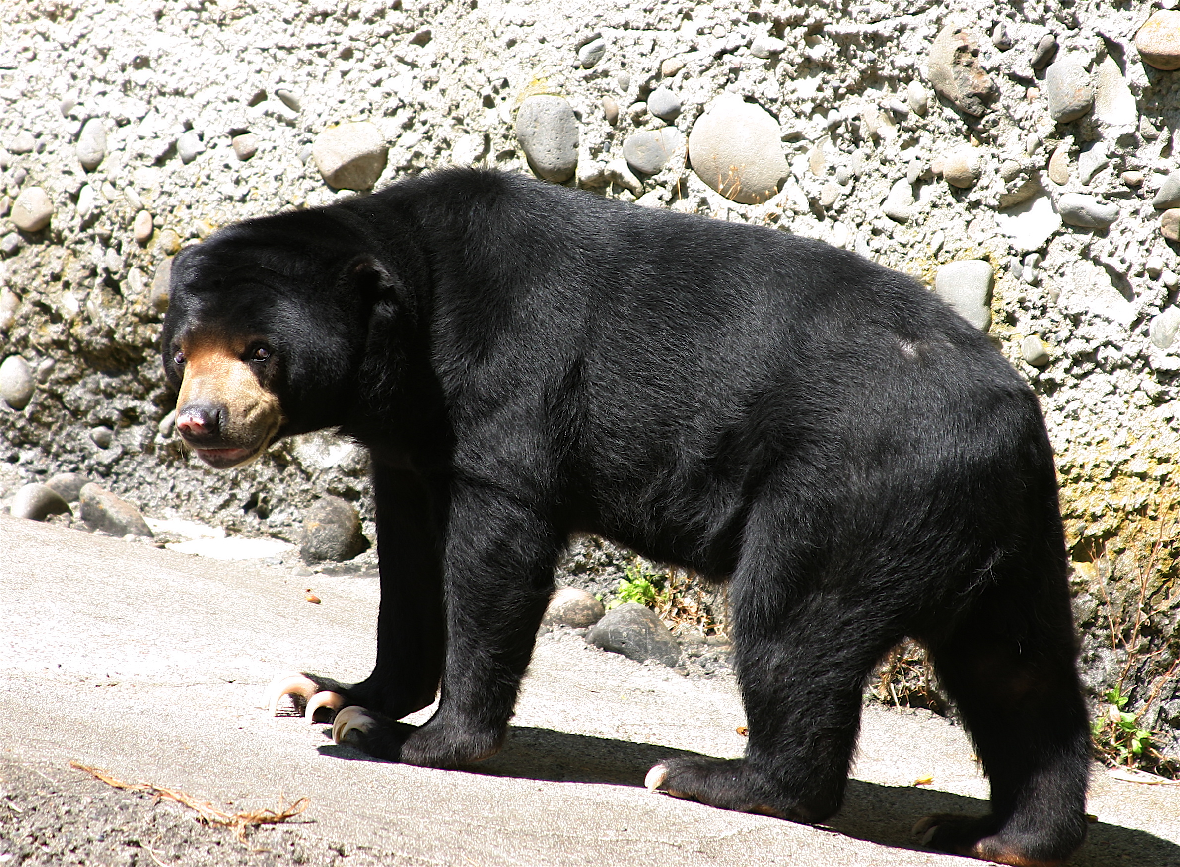 Malayan Sun Bear (Ursus malayanus) at the Oregon Zoo